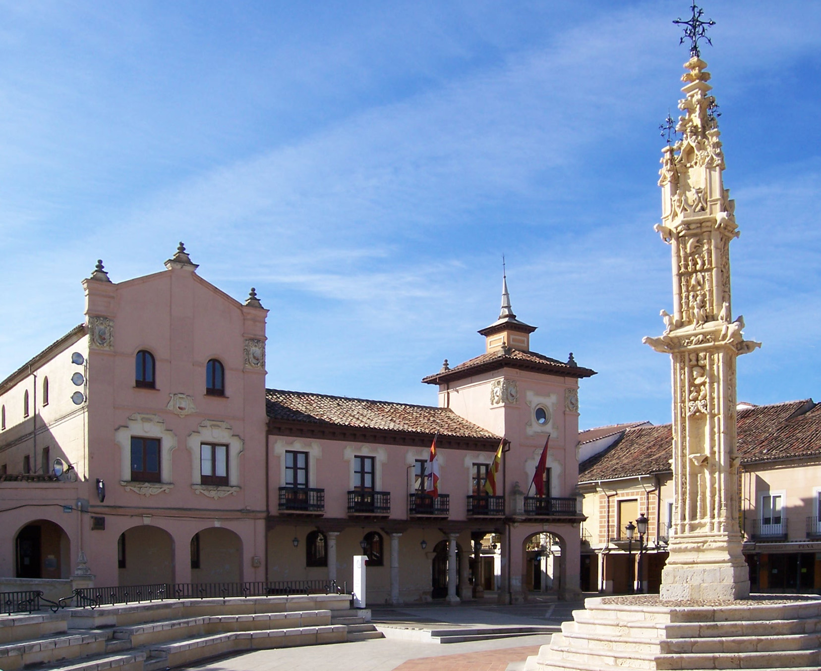 Rollo jurisdiccional situado en la plaza principal de Villalón de Campos que es un municipio de la provincia de Valladolid, España. Obra gótica del siglo XVI. Al fondo se ve el Ayuntamiento.